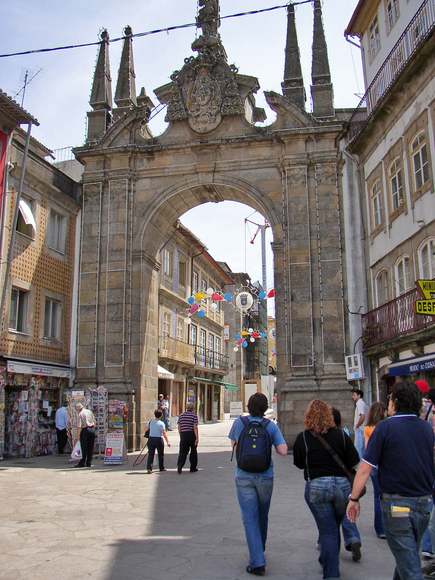 Arco da Porta Nova